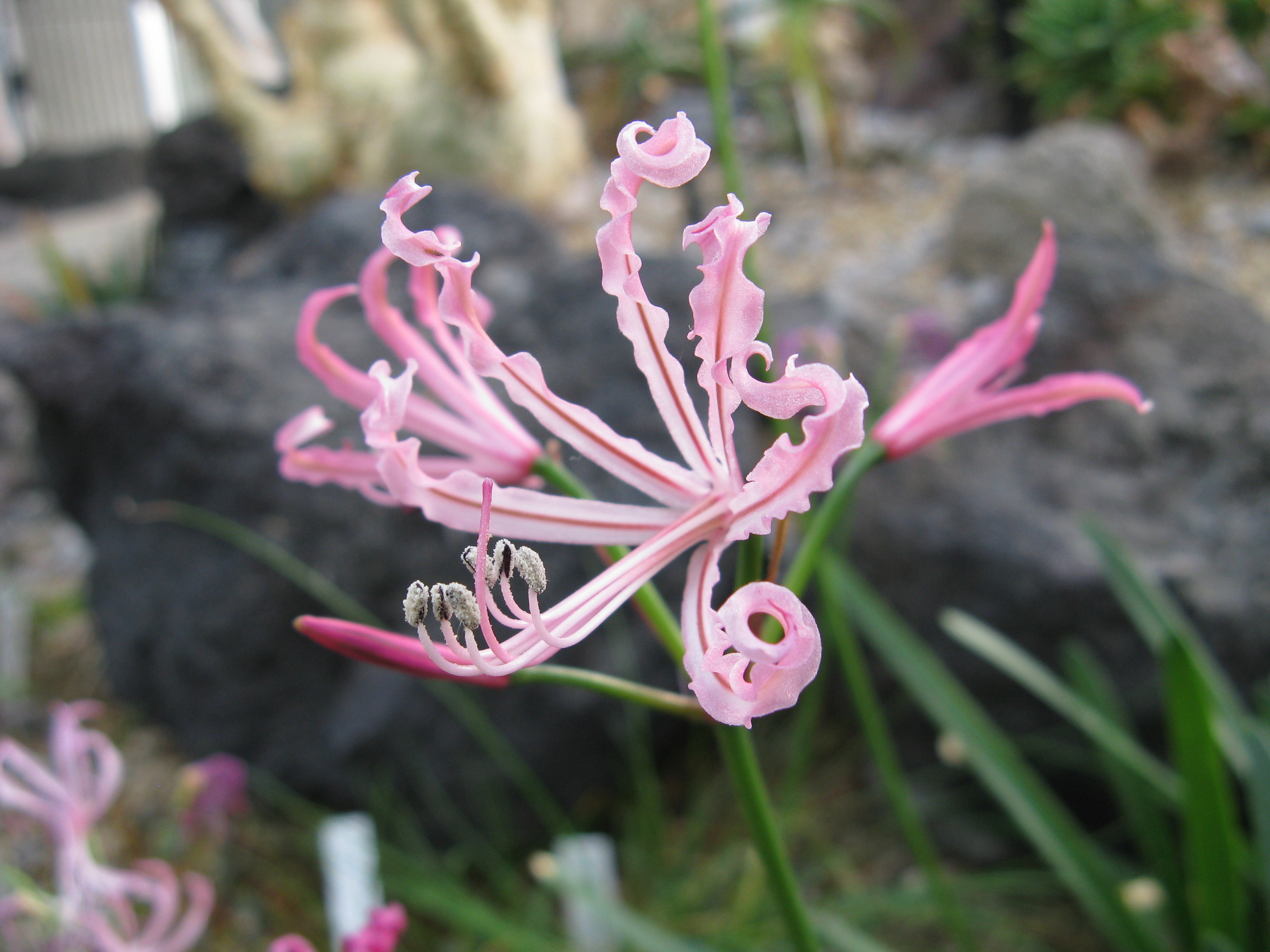 Scientific name Nerine humilis Place:Sakuya Konohana Kan,Osaka,Japan